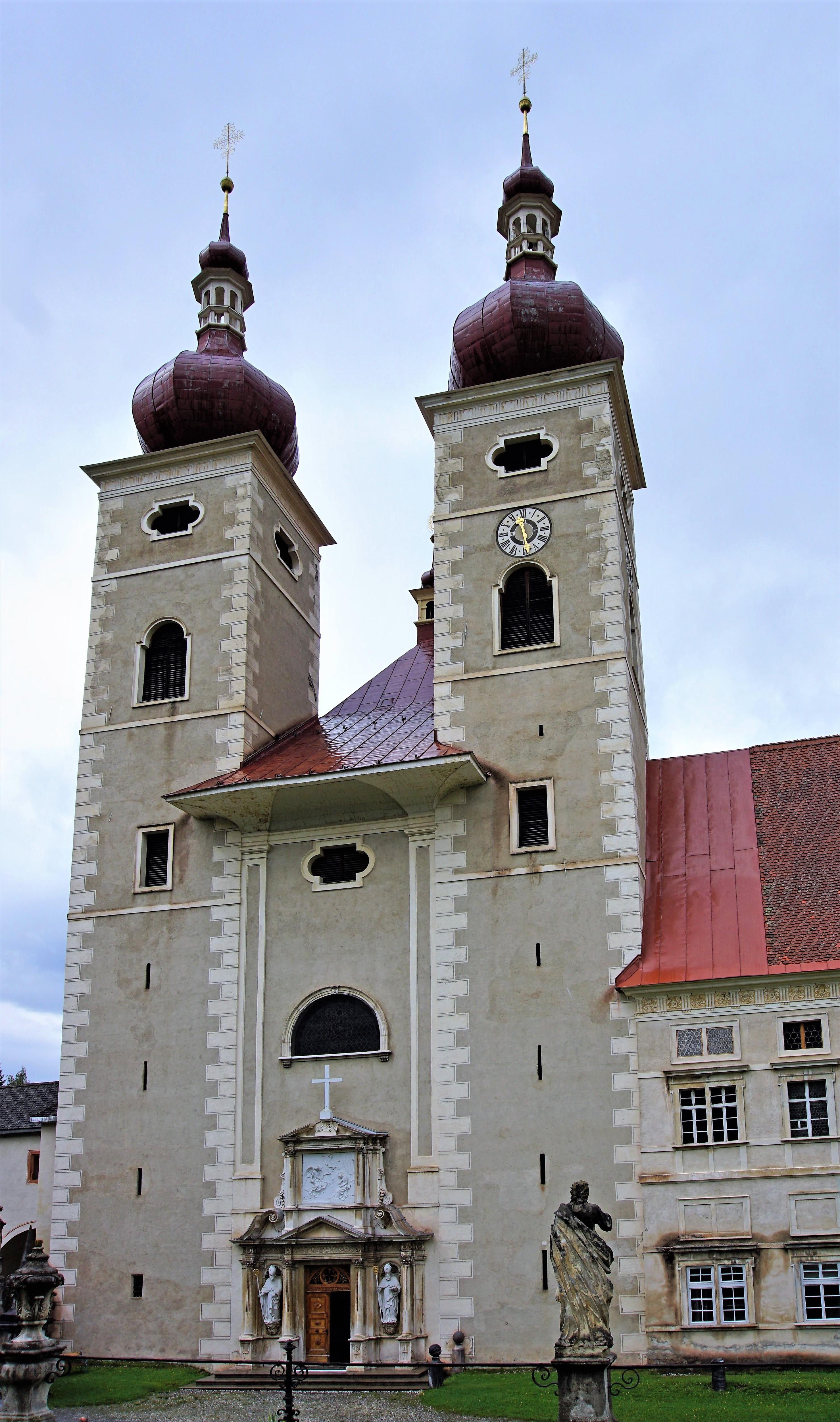 Benediktinerstift St. Lambrecht, Westfassade der Stiftskirche